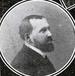 José Lapique Adrio, fotografía en Vida Gallega 1916